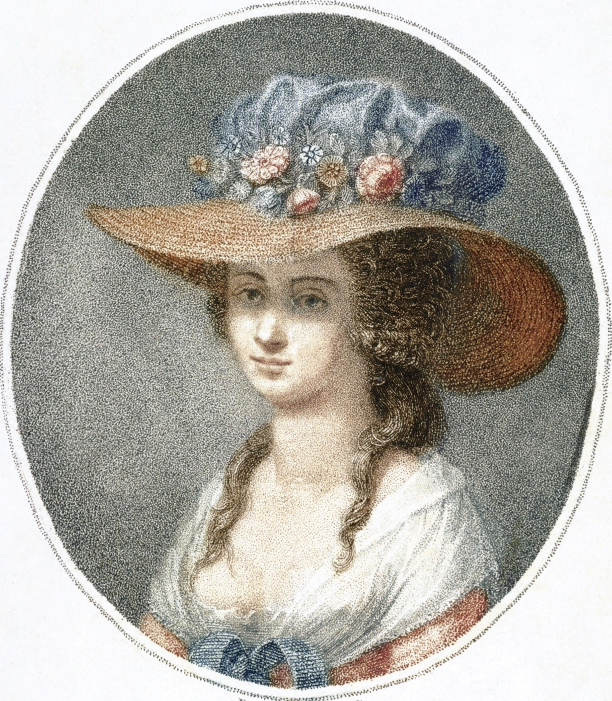 Pietro Bettelini (1763-1829): Die Sängerin Nancy Storace (1765–1817), kolorierter Kupferstich, London 1788, 11,2 × 15 cm (Ausschnitt). Bibliothek der Goethe-Universität Frankfurt am Main.